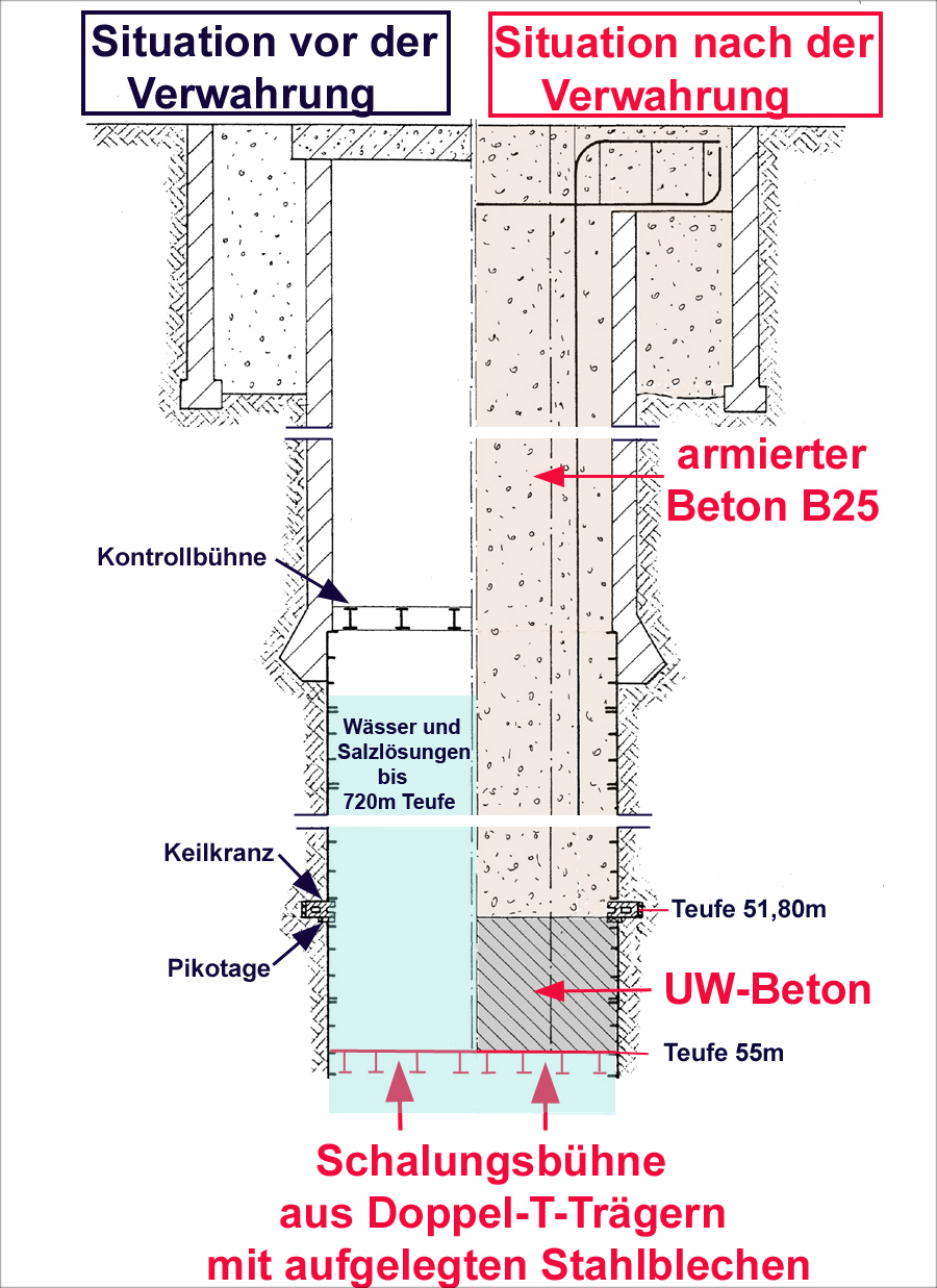 Conow, Schnitt durch die Schachtplombe